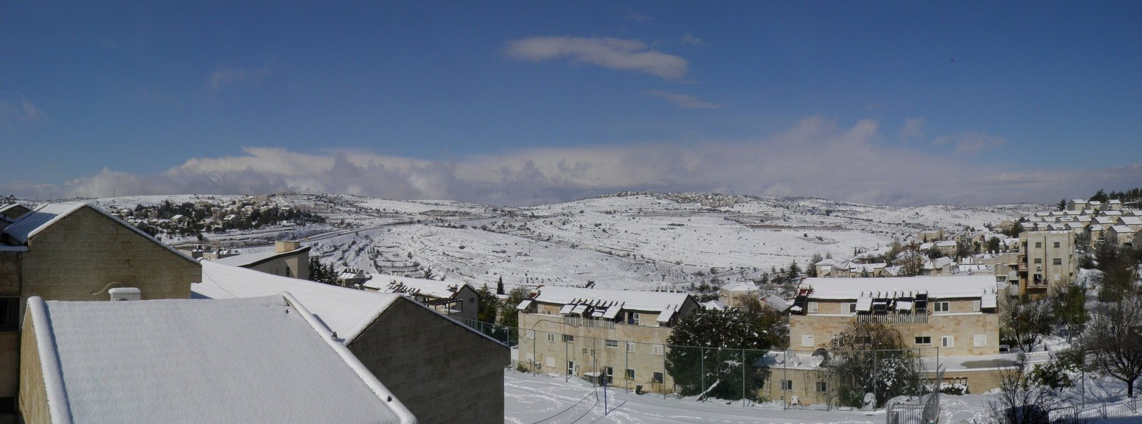 גוש עציון שלג אפרת